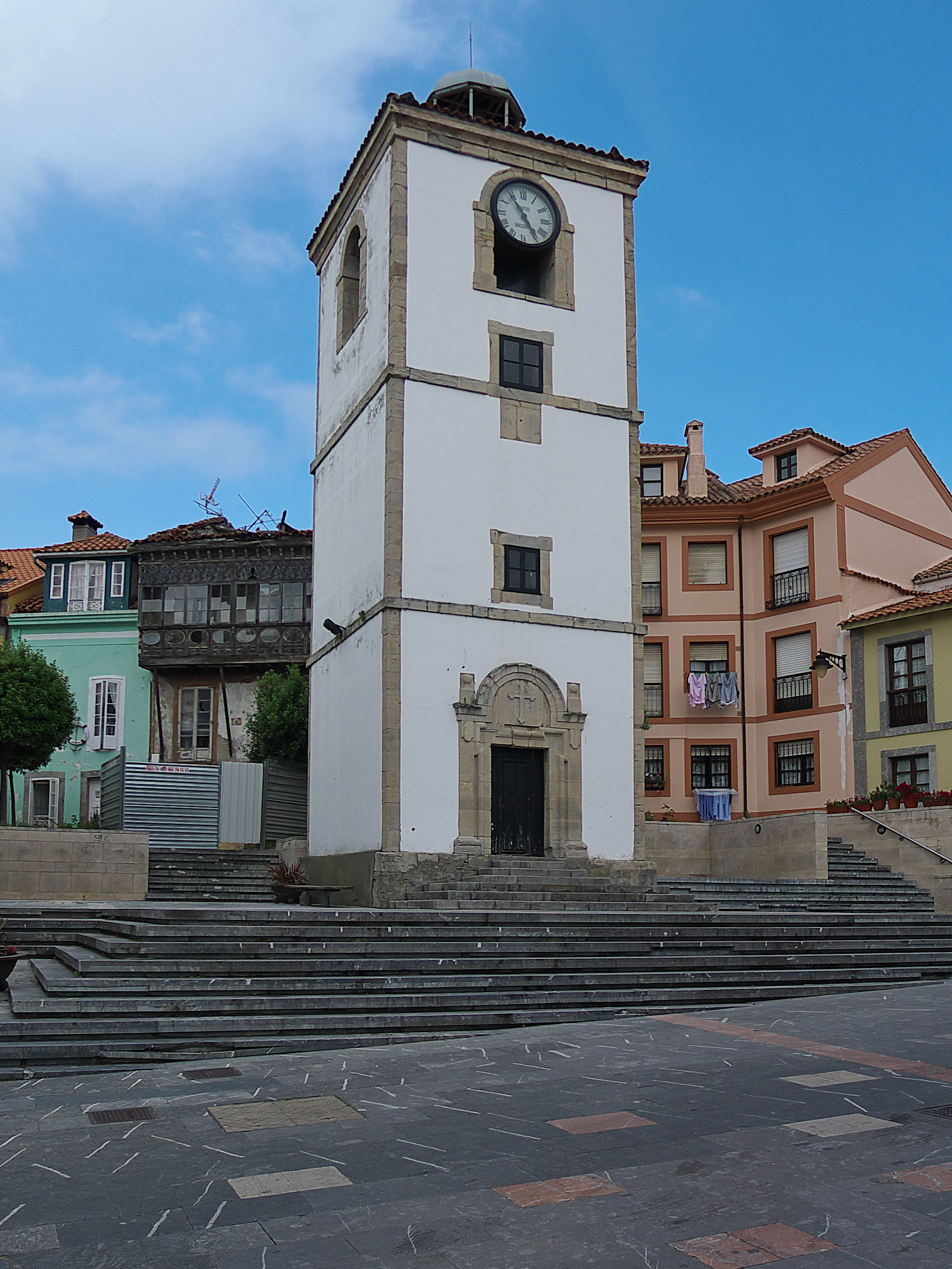 Torre vigía del siglo XVIII